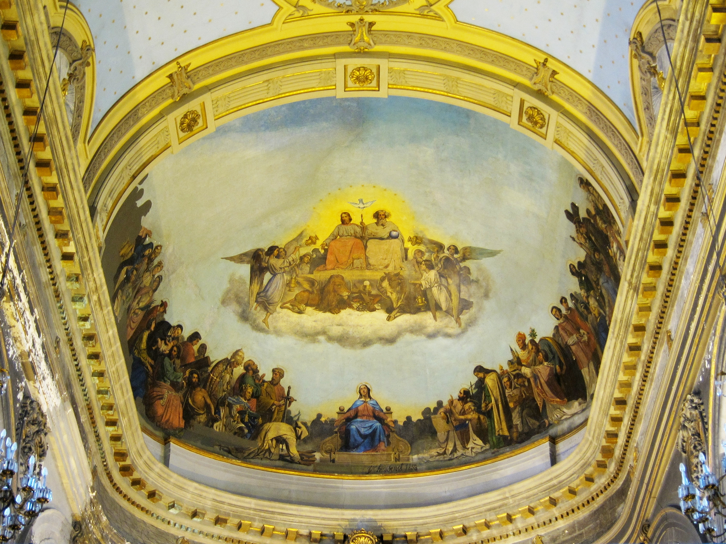 La fresque du plafond du chœur de l'Église Saint-André de Lille (Nord), L'Extase des saints devant la Trinité (1853) de Joseph Hussenot. .